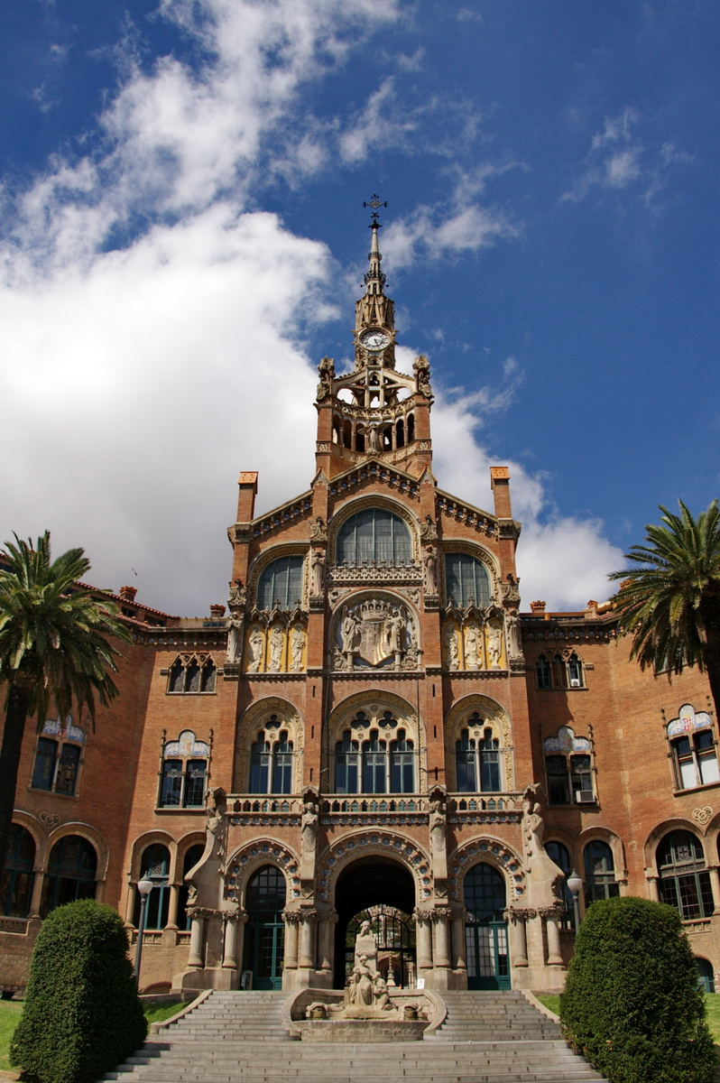 Hospital de Sant Pau de Barcelona (Catalunya), obra de Lluís Domènech i Montaner (1905-1910). Façana principal i escala d'accés.